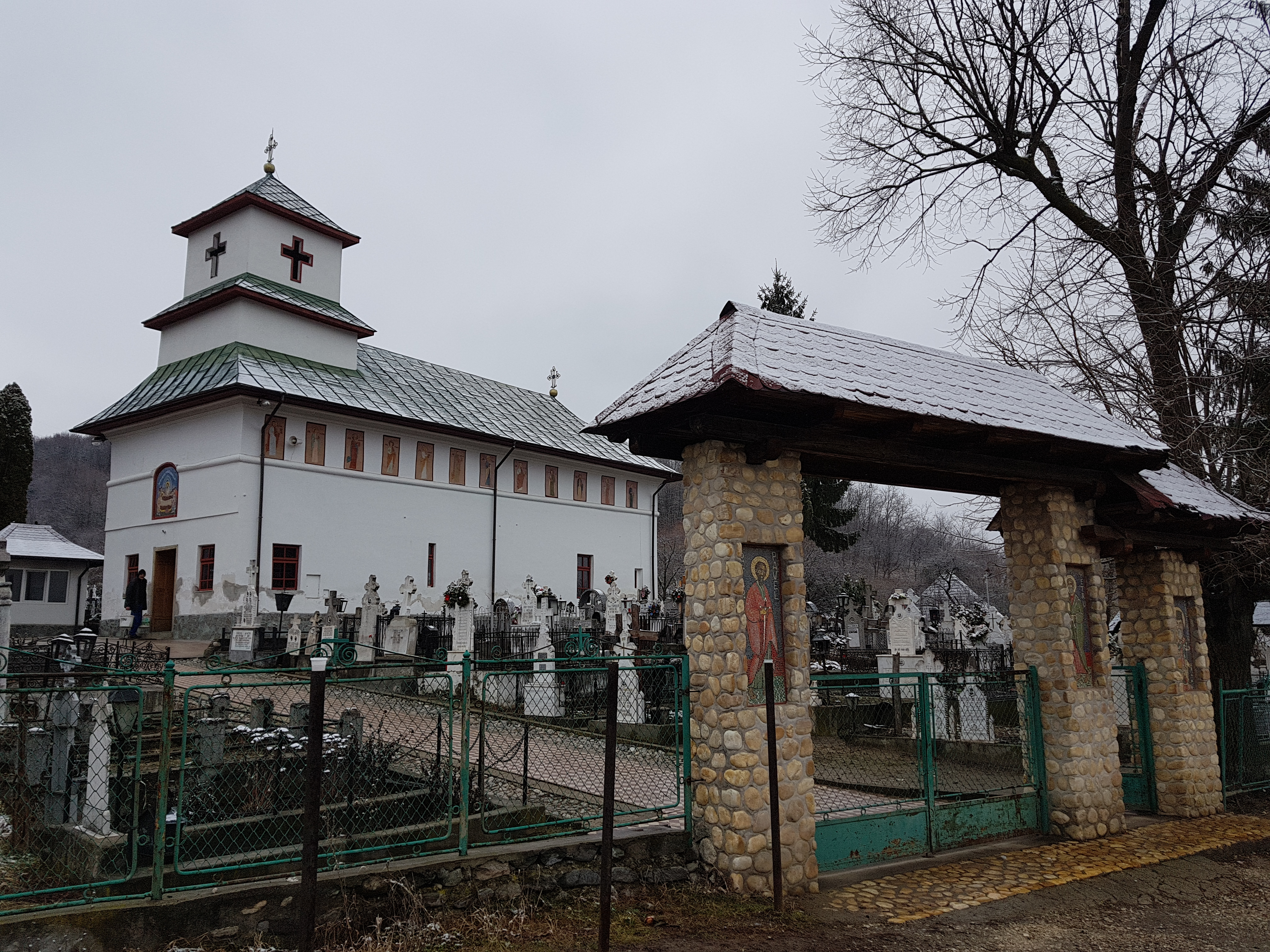 Biserica „Adormirea Maicii Domnului”